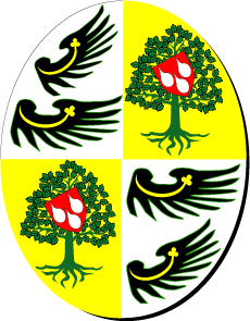 armes des Thellusson anglais (Barons Rendlesham) et français (branche éteinte)